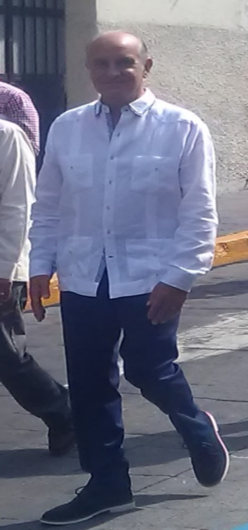 Juan Manuel Diez Francos, Alcalde de Orizaba